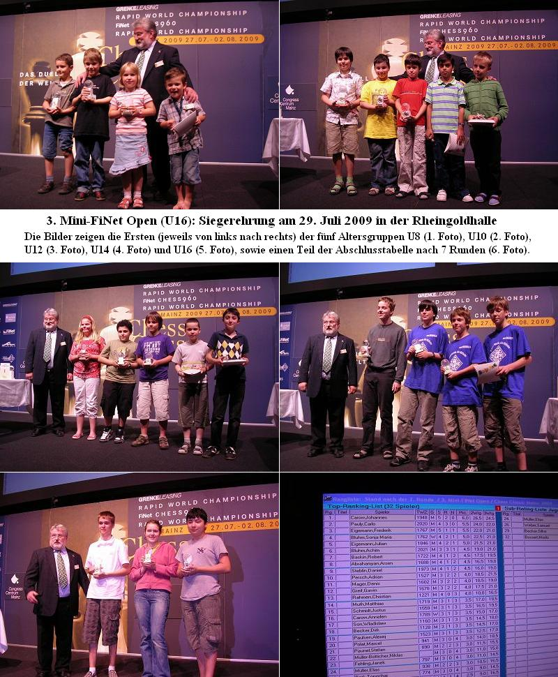 Siegerehrung für das 3. Mini-FiNet-Open am 29. Juli 2009, anlässlich der Chess Classic in Mainz.